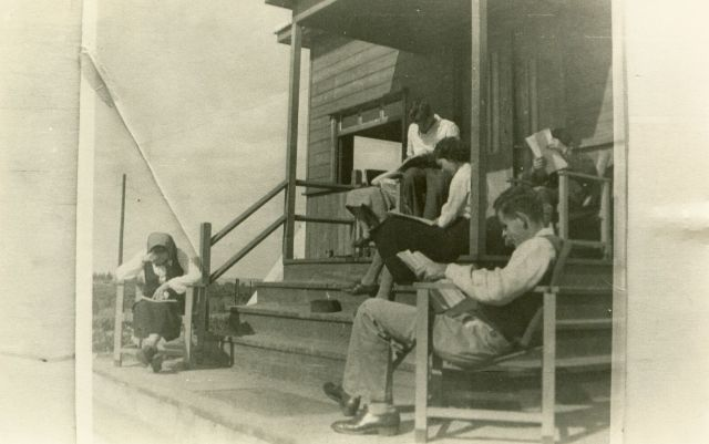 Kibbutz Eilon חדר קריאה בקיבוץ אילון. ייתכן שהתמונה צולמה בפתח תקווה לפני עליית הגרעין הראשון של הקיבוץ להתיישבות בגליל